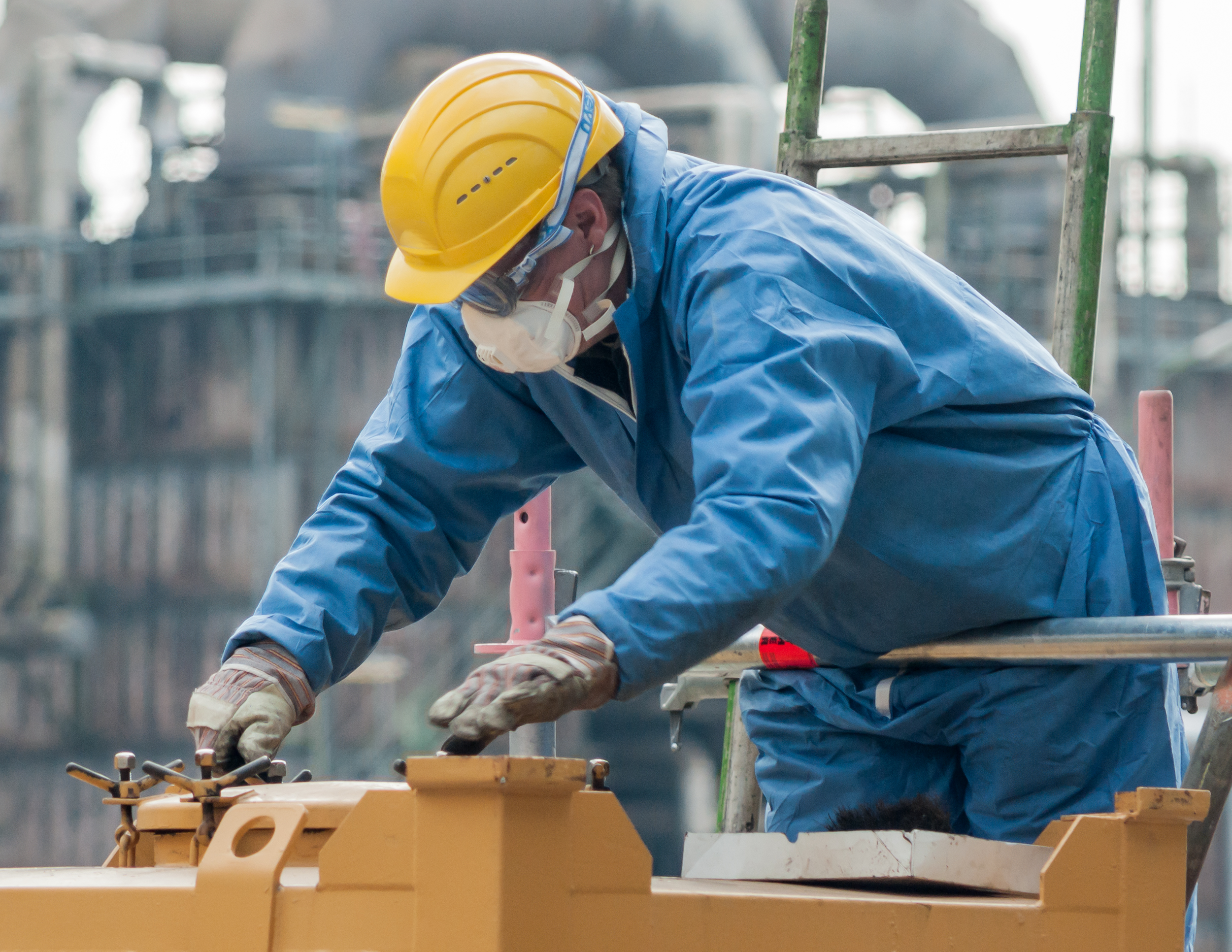 Cologne. Germany: Industrial worker with dust protective clothing and respiratory mask